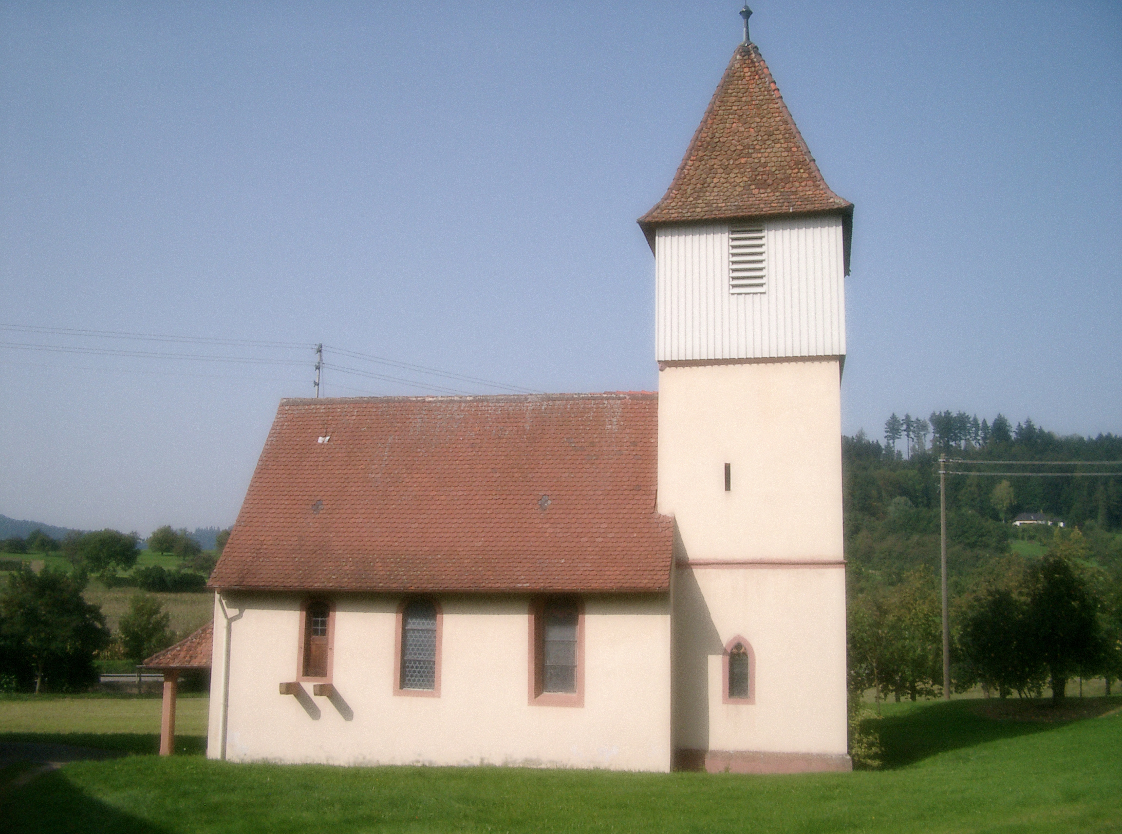 Kapelle St.Peter